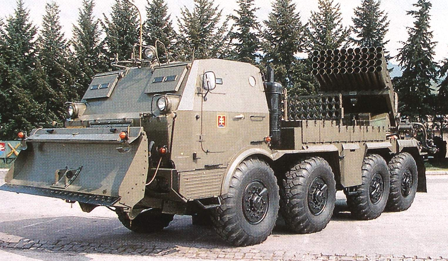 reprodukcia z ročenky Armády SR, 122.4 mm raketomet vz.70